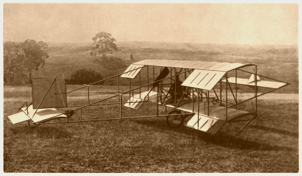 Duigan pusher biplane